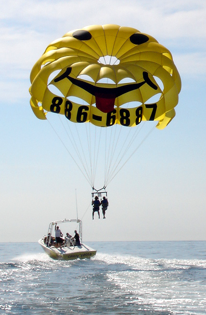 Parasailing in Wildwood NJ Hang Loose Parasail! 609 522 WILD